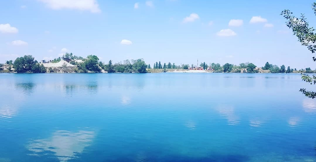 Вид на одну из Старо-Черекских озёр